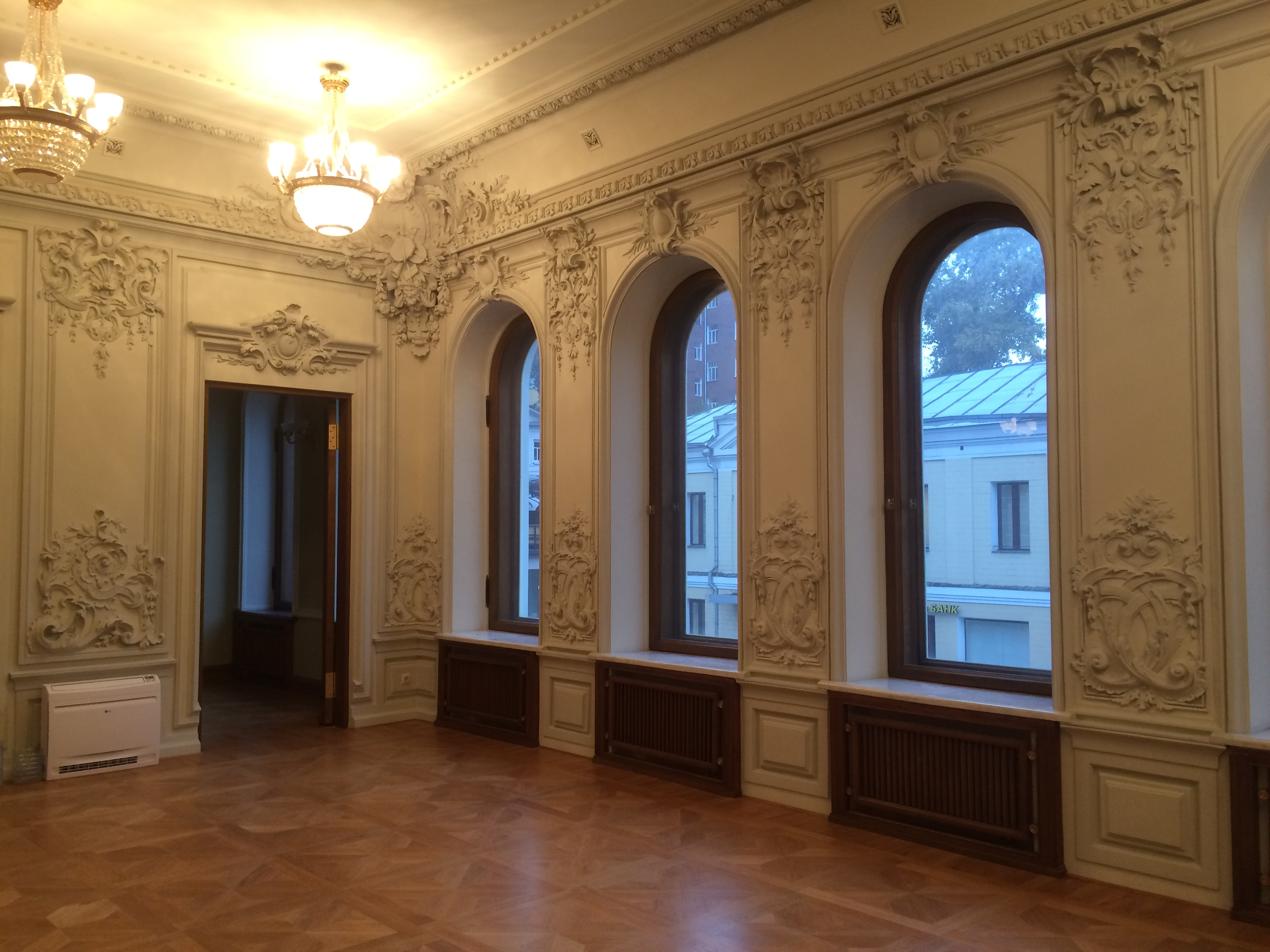 Оформление одного из залов особняка Т. И. Коробкова по адресу Москва, Пятницкая улица, 33-35 стр. 1. Фотография сделана в 2017 году после проведения комплексной реставрации здания